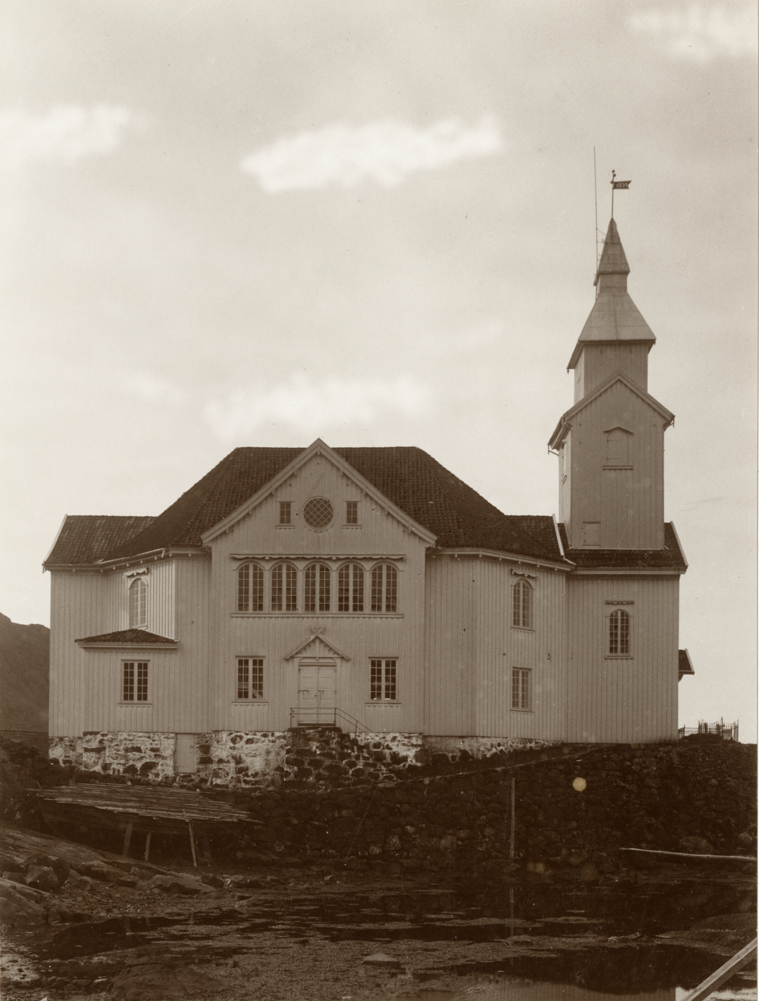 Hidra kirke i Flekkefjord, Vest-Agder